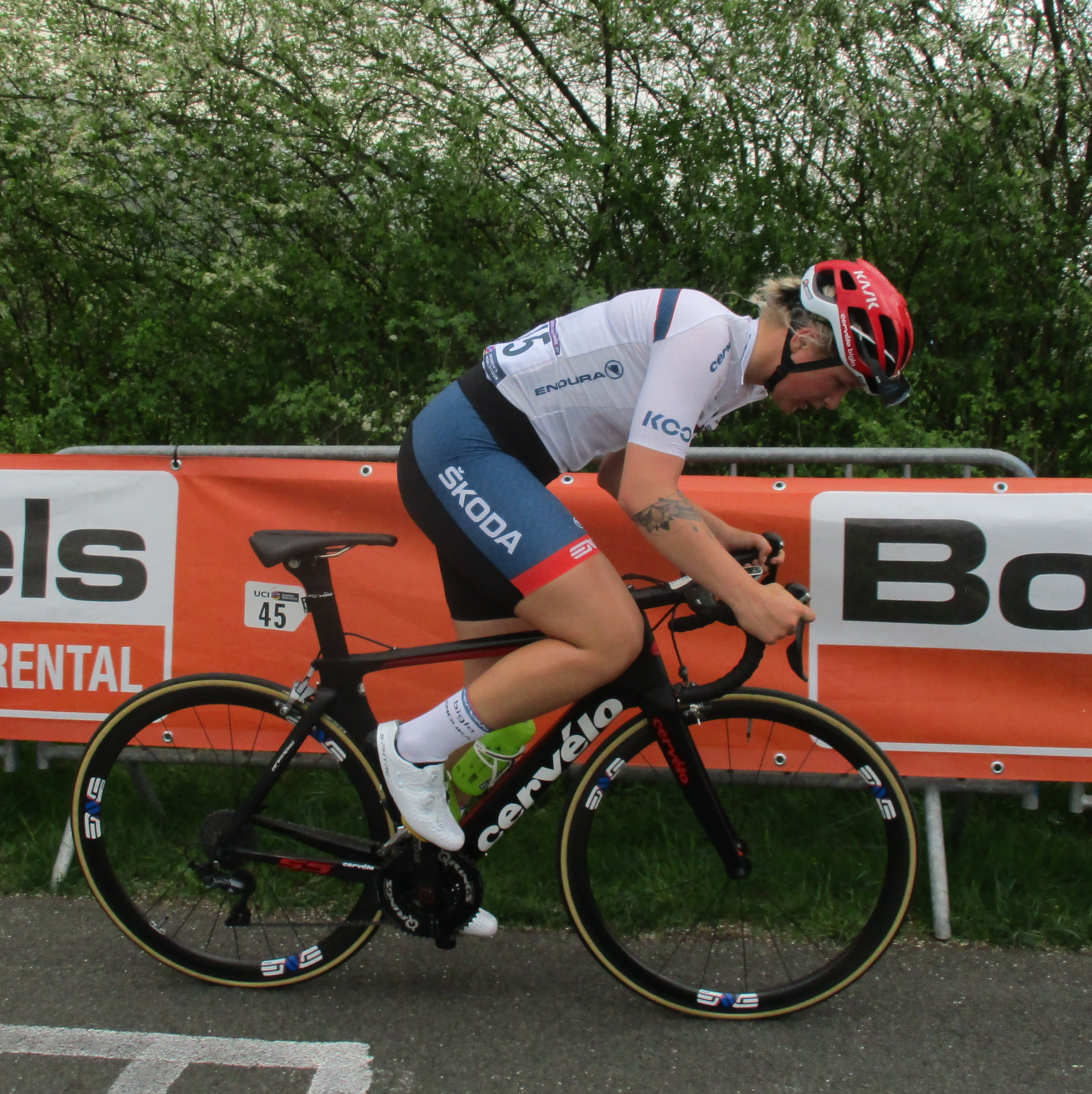 Beklimming van La Redoute tijdens Luik-Bastenaken-Luik 2018 voor vrouwen.